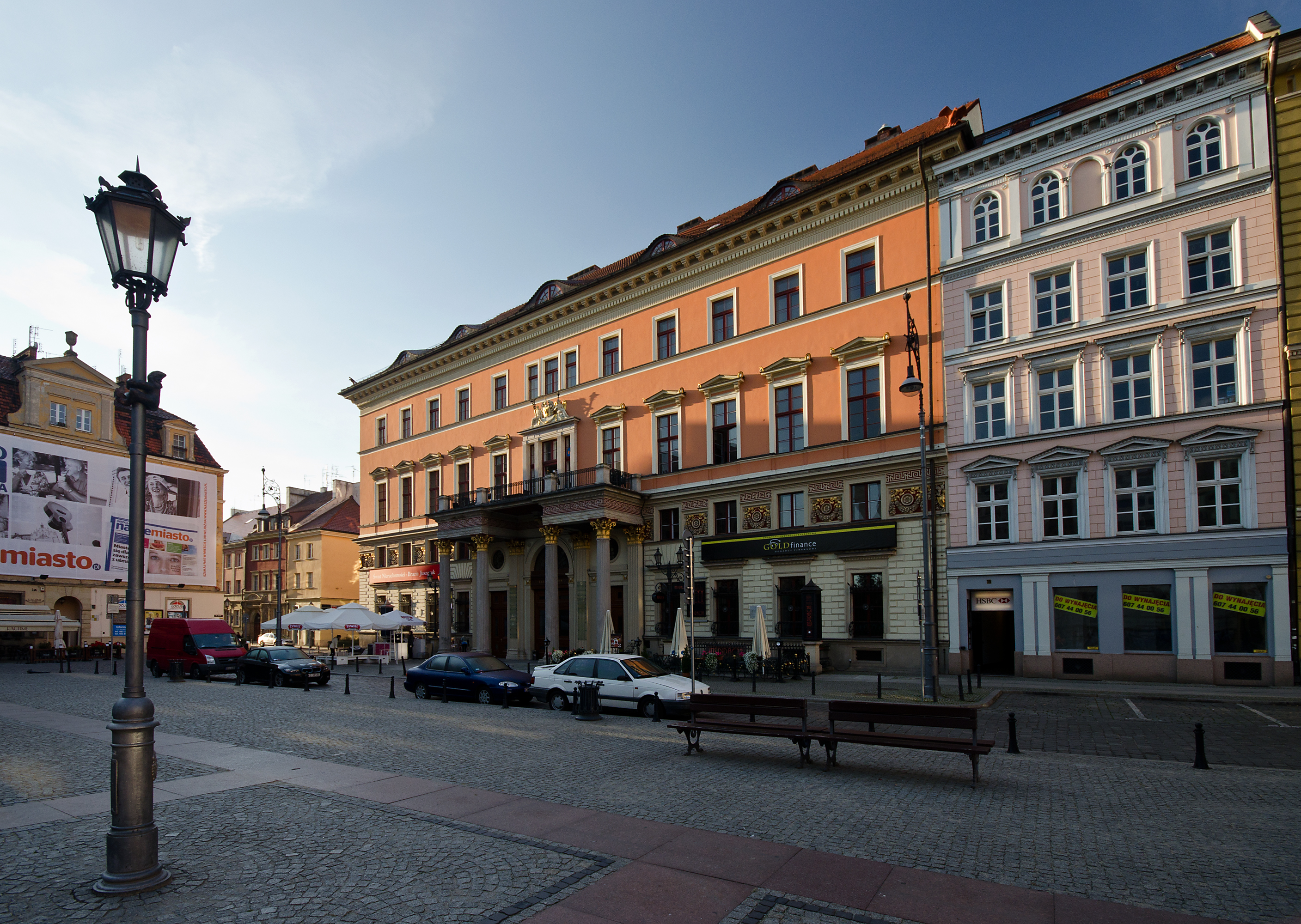 Wrocław Stare Miasto - pl. Solny 16 - Stara Giełda, obecnie budynek biurowy, 1822-1824